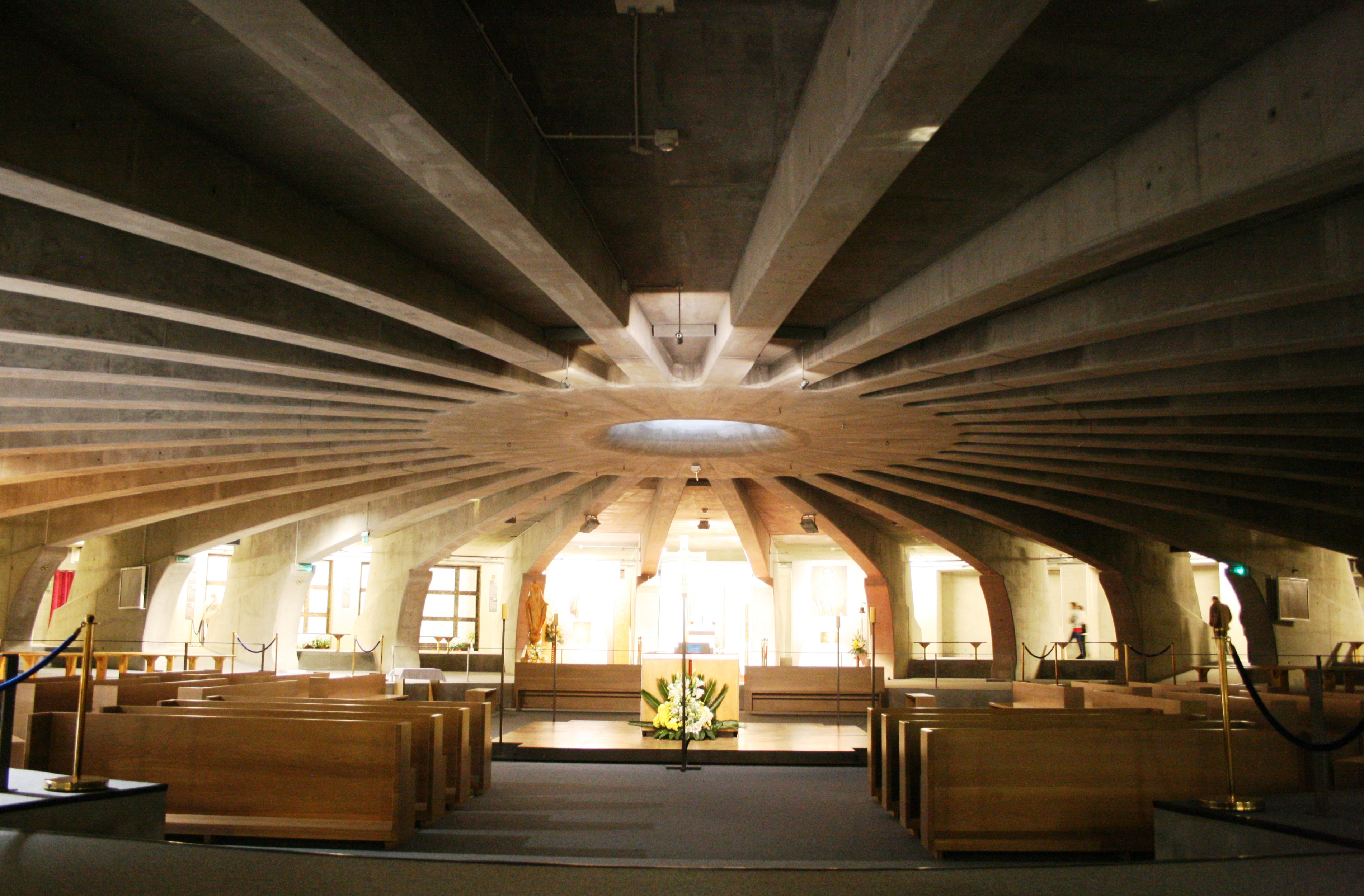 Dolny kościół Świątyni Opatrzności Bożej w Warszawie